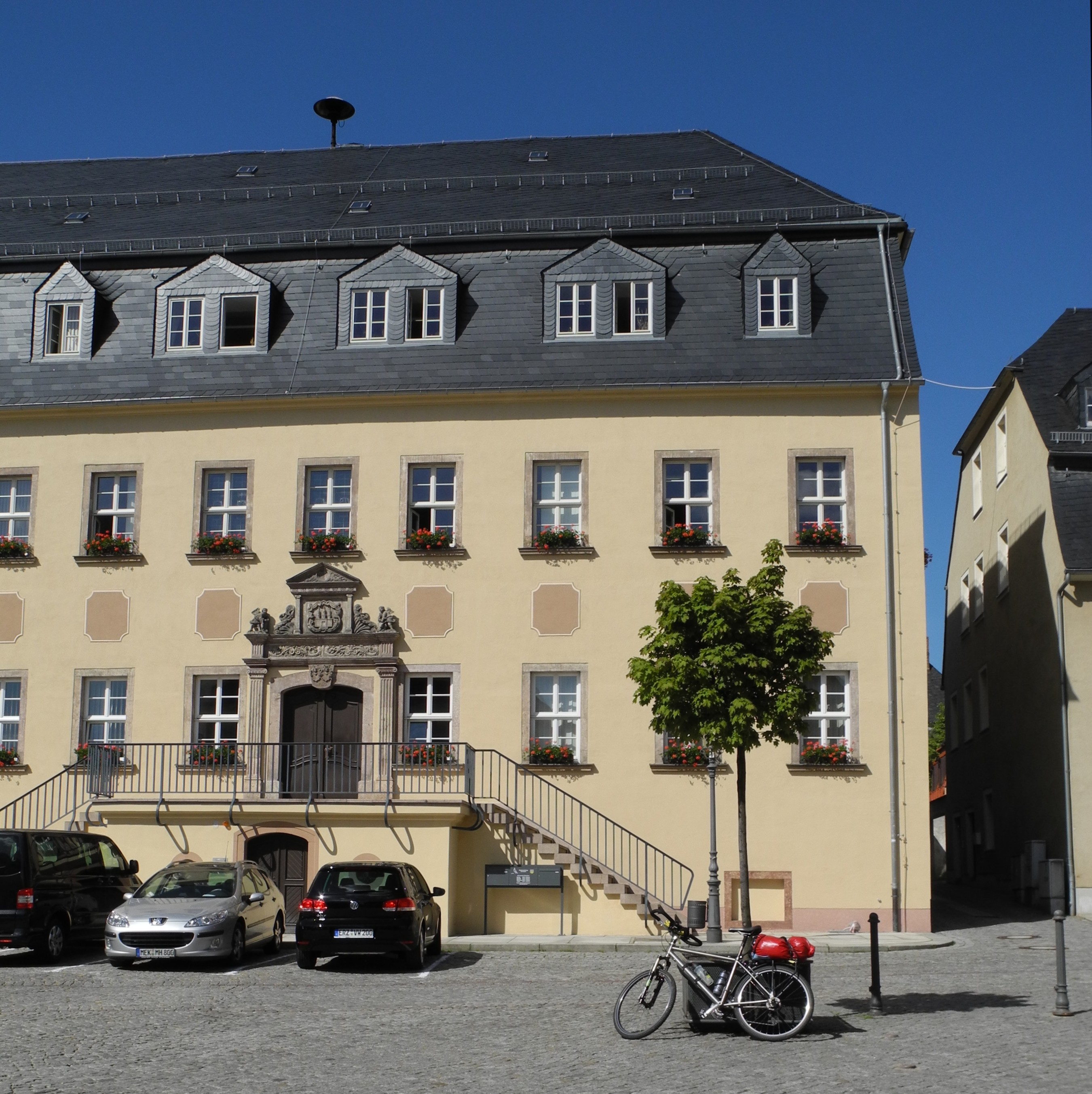 Zschopau - Neues Rathaus